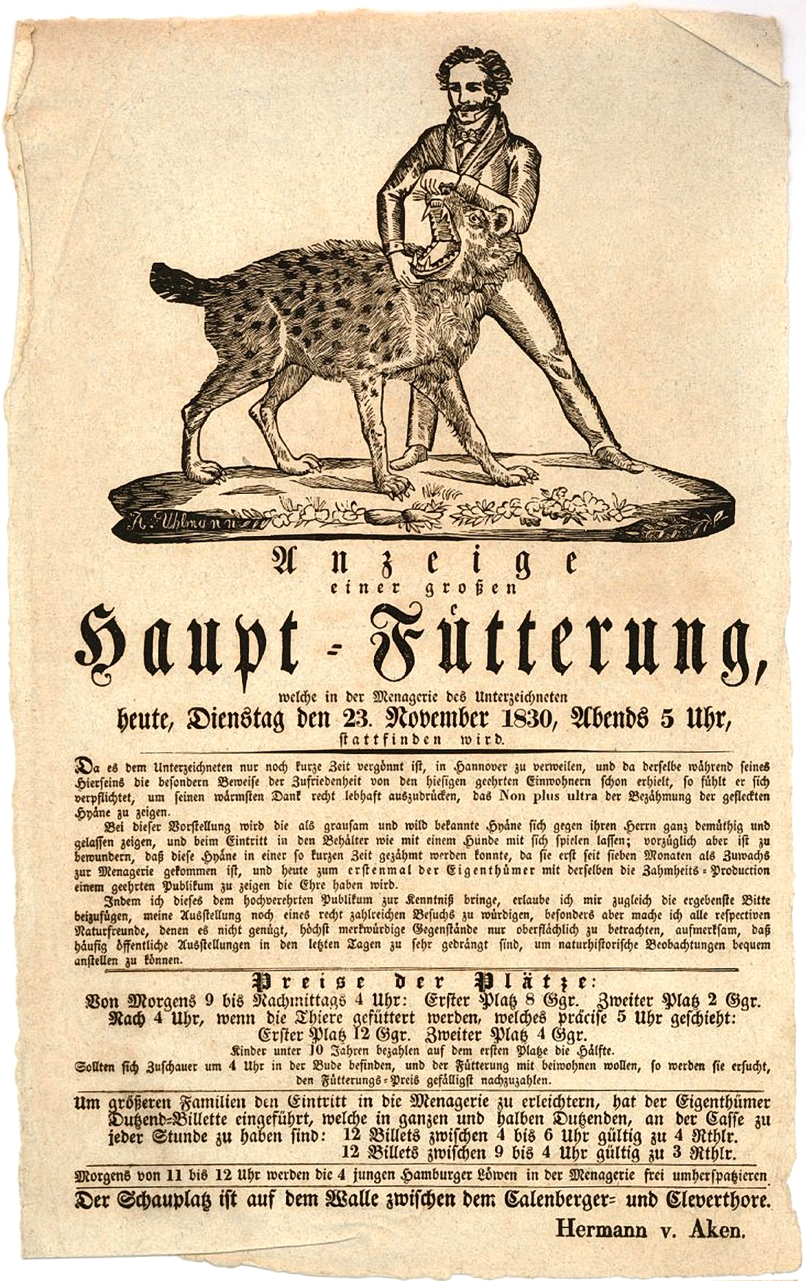 Ankündigungszettel der Mernagerie van Aken: Anzeige einer großen Haupt-Fütterung welche in der Menagerie des Unterzeichneten...stattfinden wird. Hannover, 1830